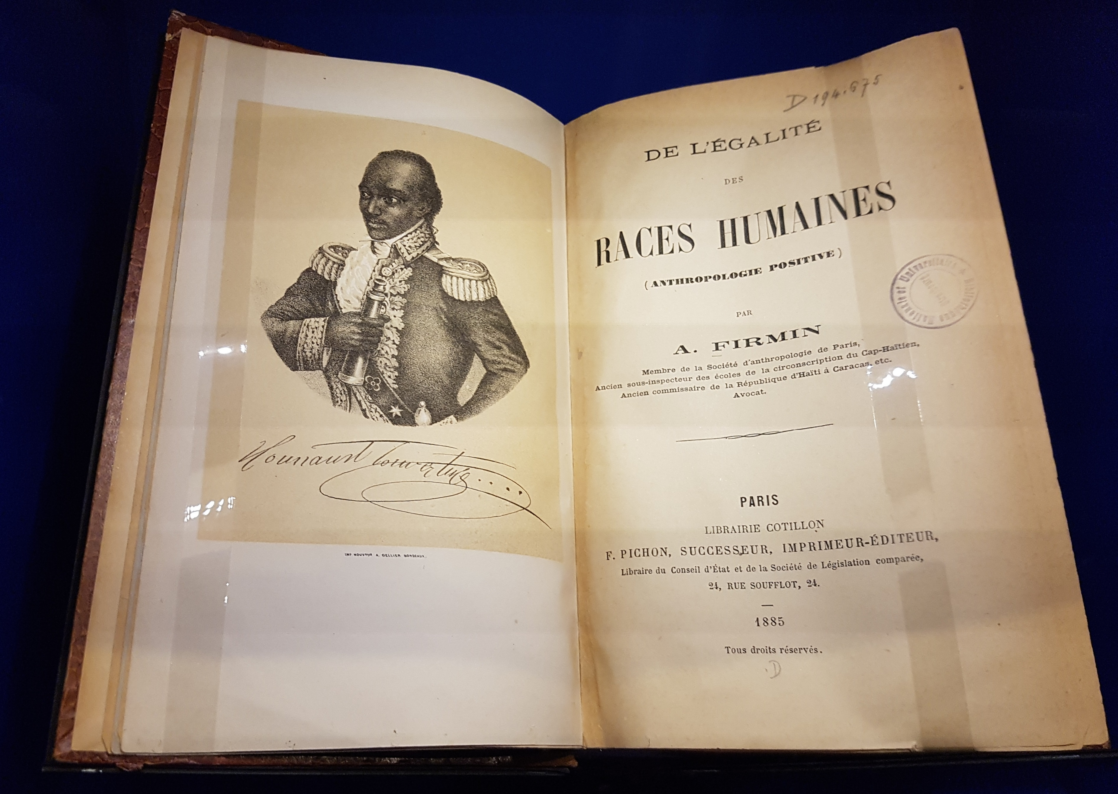 De l'égalité des races humaines : anthropologie positive Anténor Firmin (1850-1910) Paris, F. Pichon, 1885 667 p.